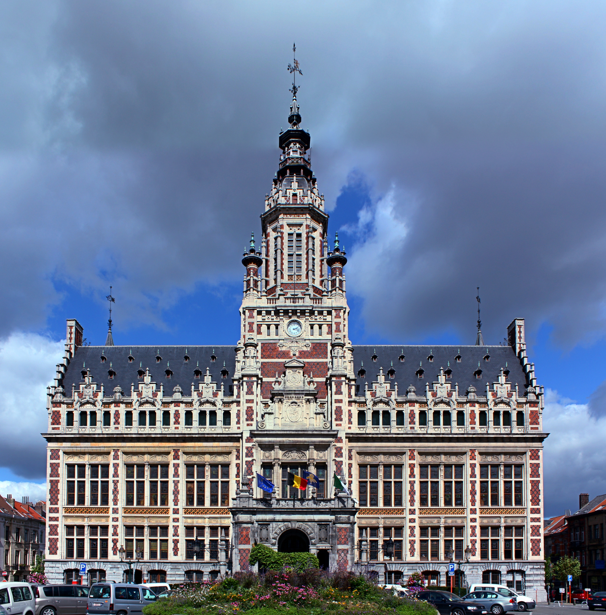 Hôtel communal de Schaerbeek, construit en 1884-1887 par Jules-Jacques Van Ysendyck. Monument classé n°2264-0007/0